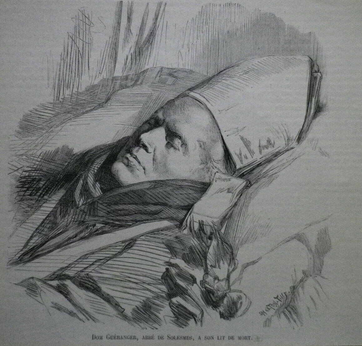 Dom Guéranger à son lit de mort. Coupure de presse 1875.